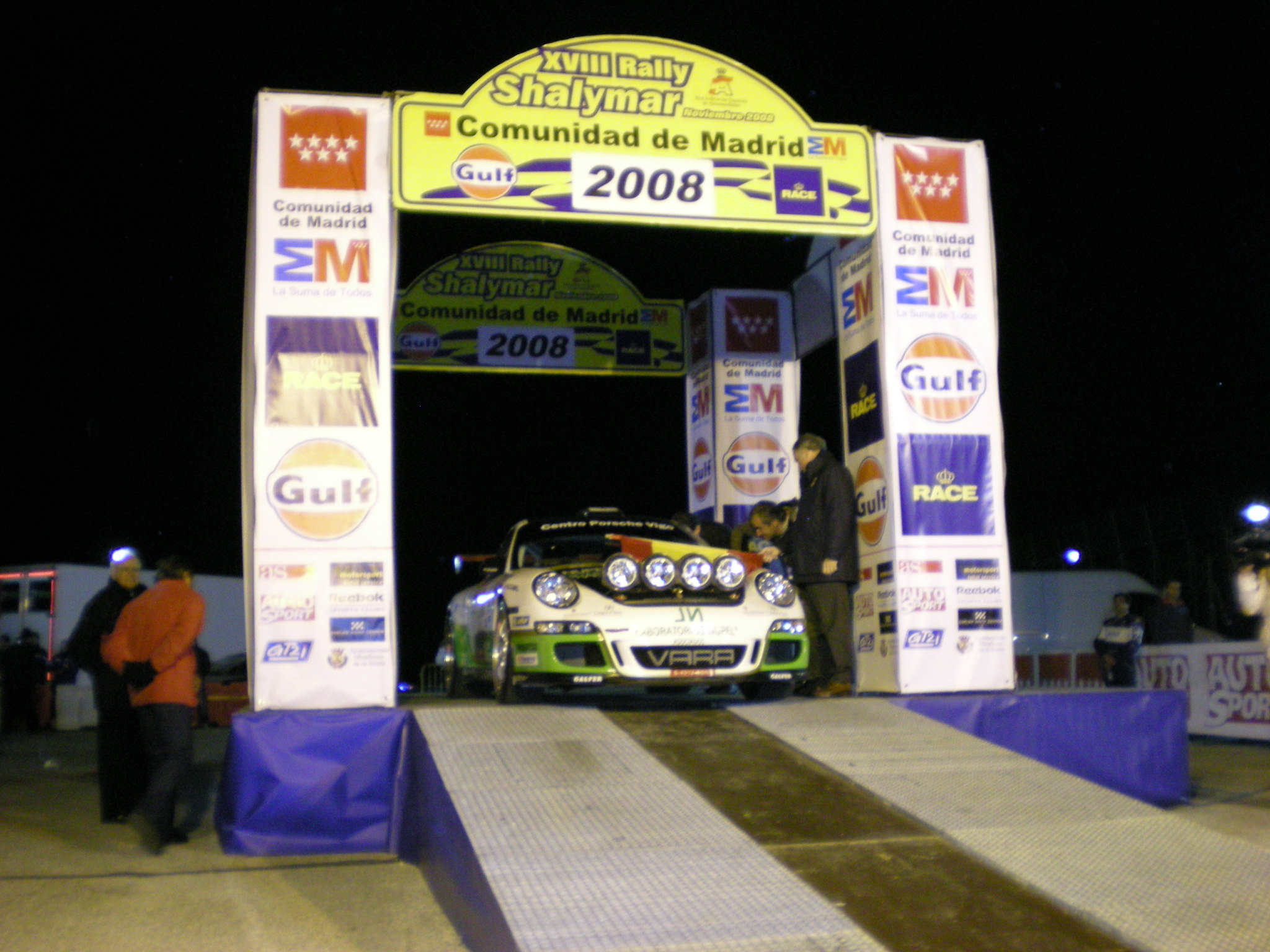 Salida de un participante en el Rally Shalymar 2008